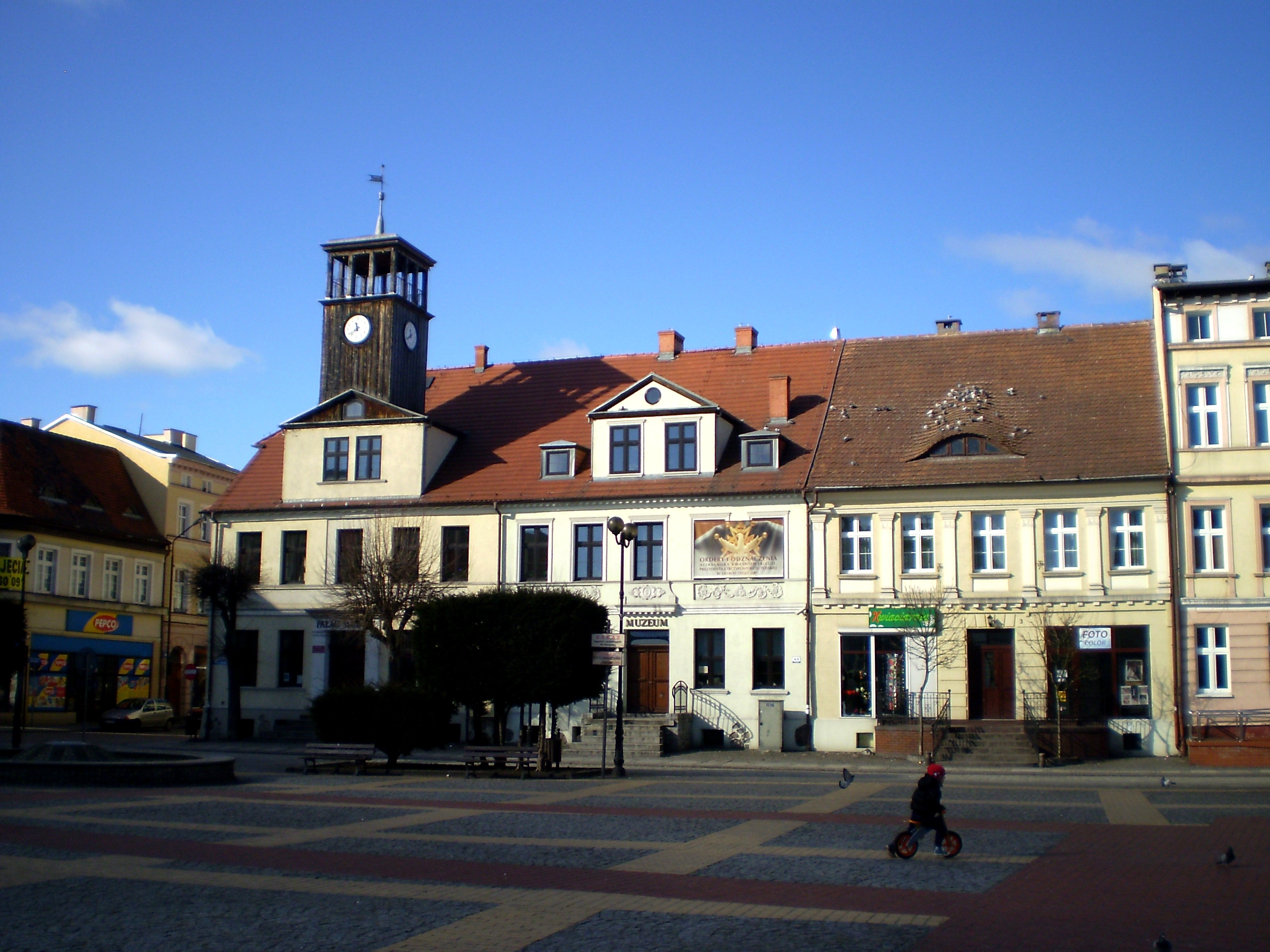 Ratusz z XIX w.,Białogard, Plac Wolności 5